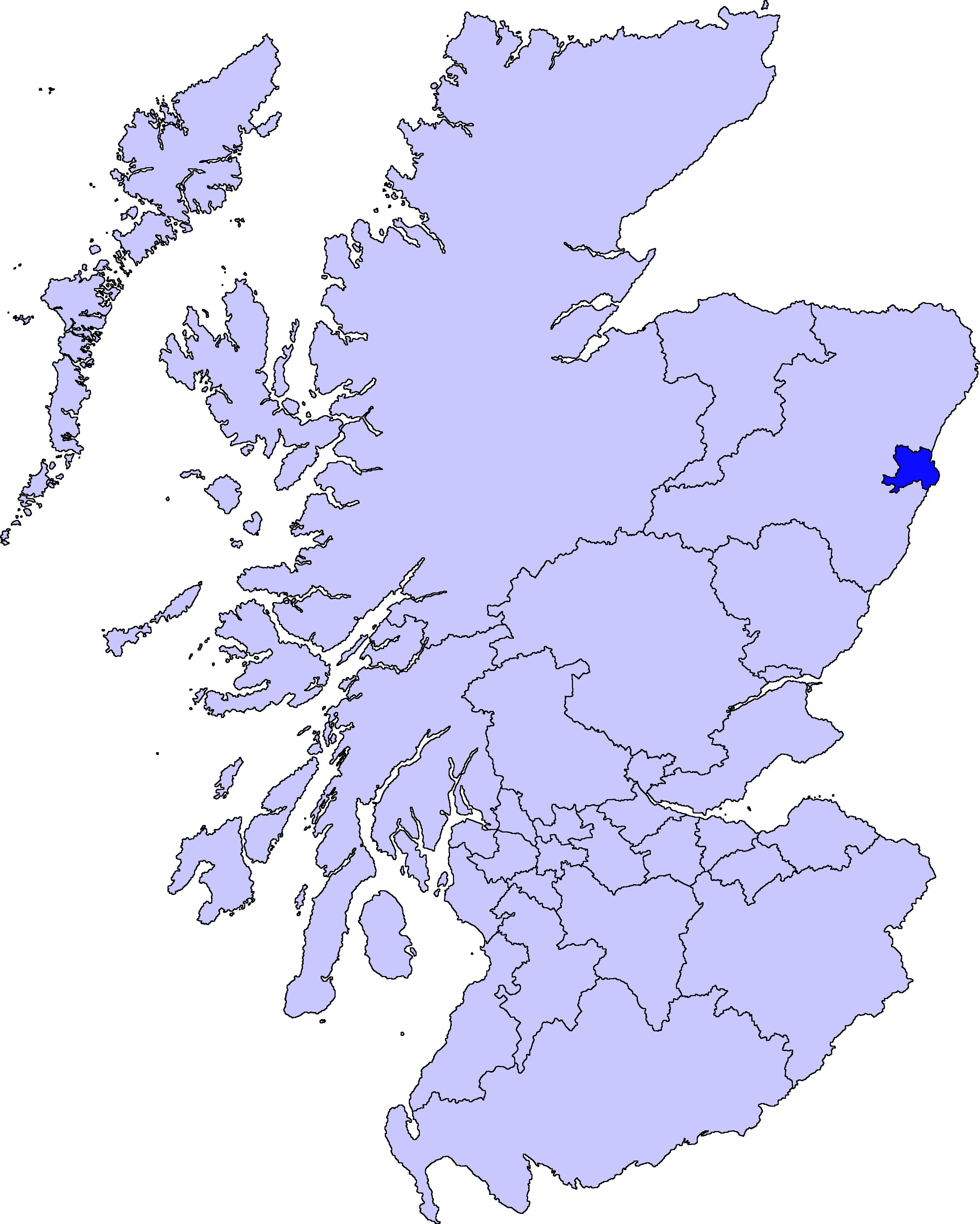 map of Aberdeen